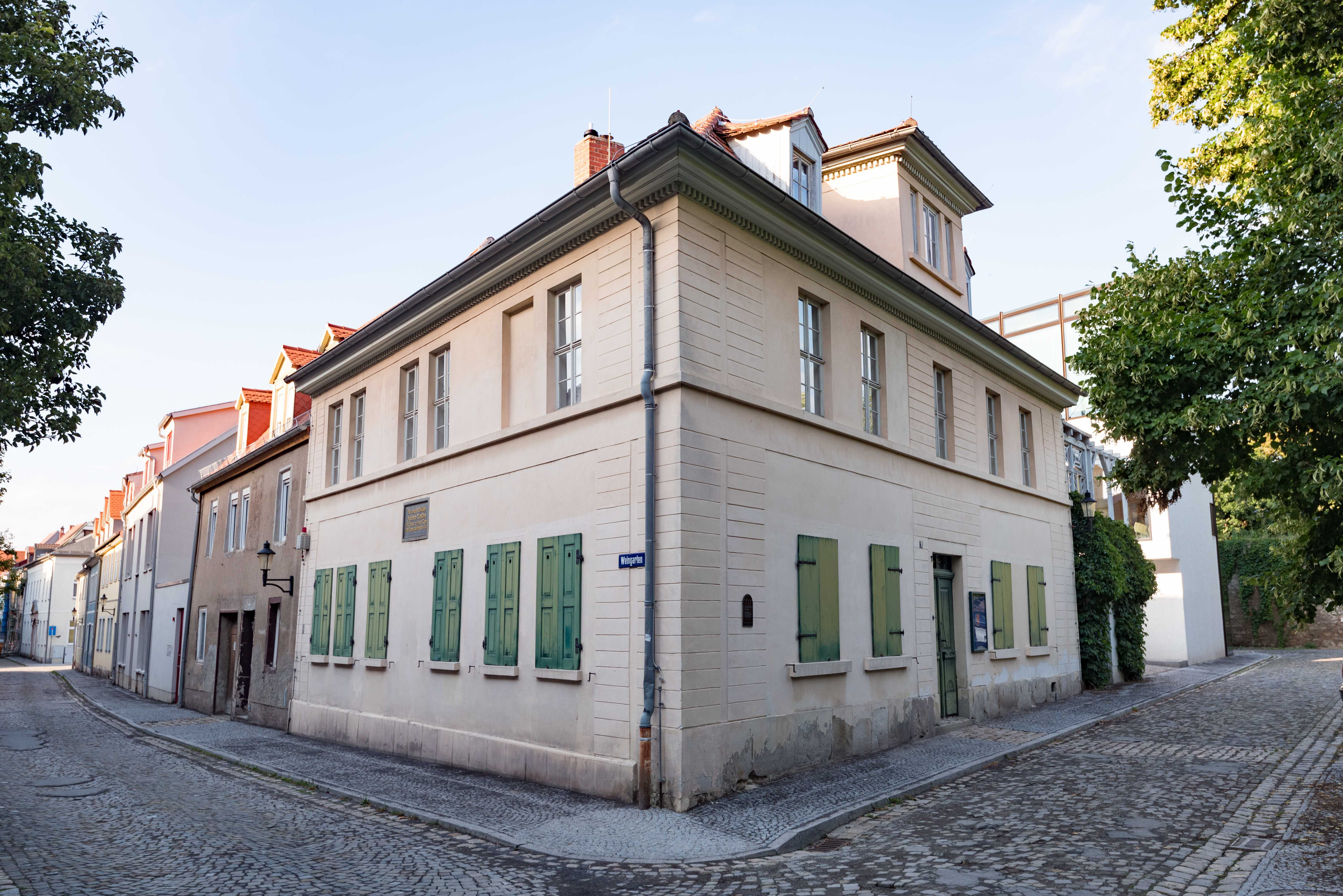 Naumburg (Saale), Weingarten 18